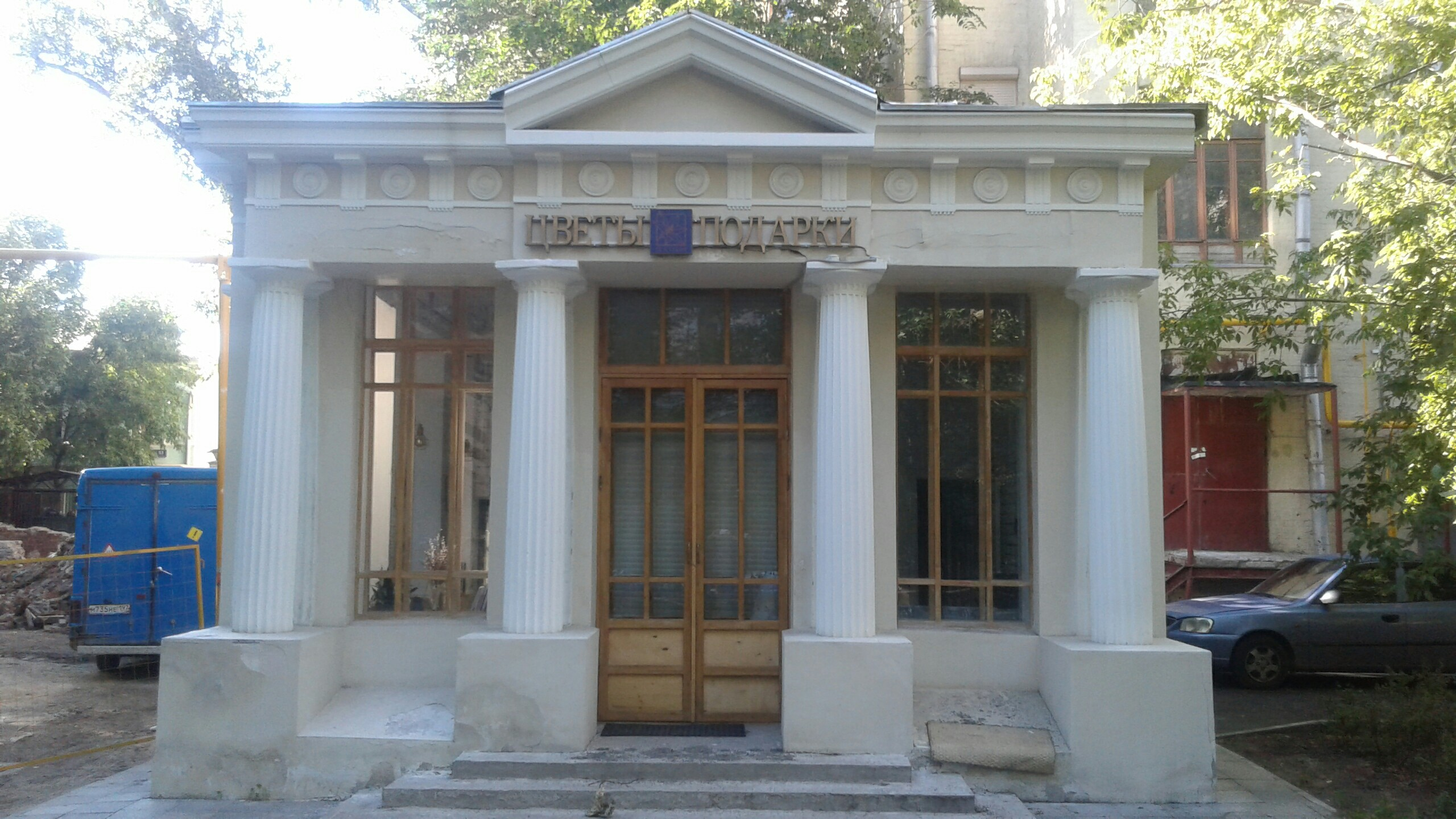 Памятник архитектуры - Садовый павильон в переулке Сивцев Вражек, район Арбат, Москва после реконструкции.